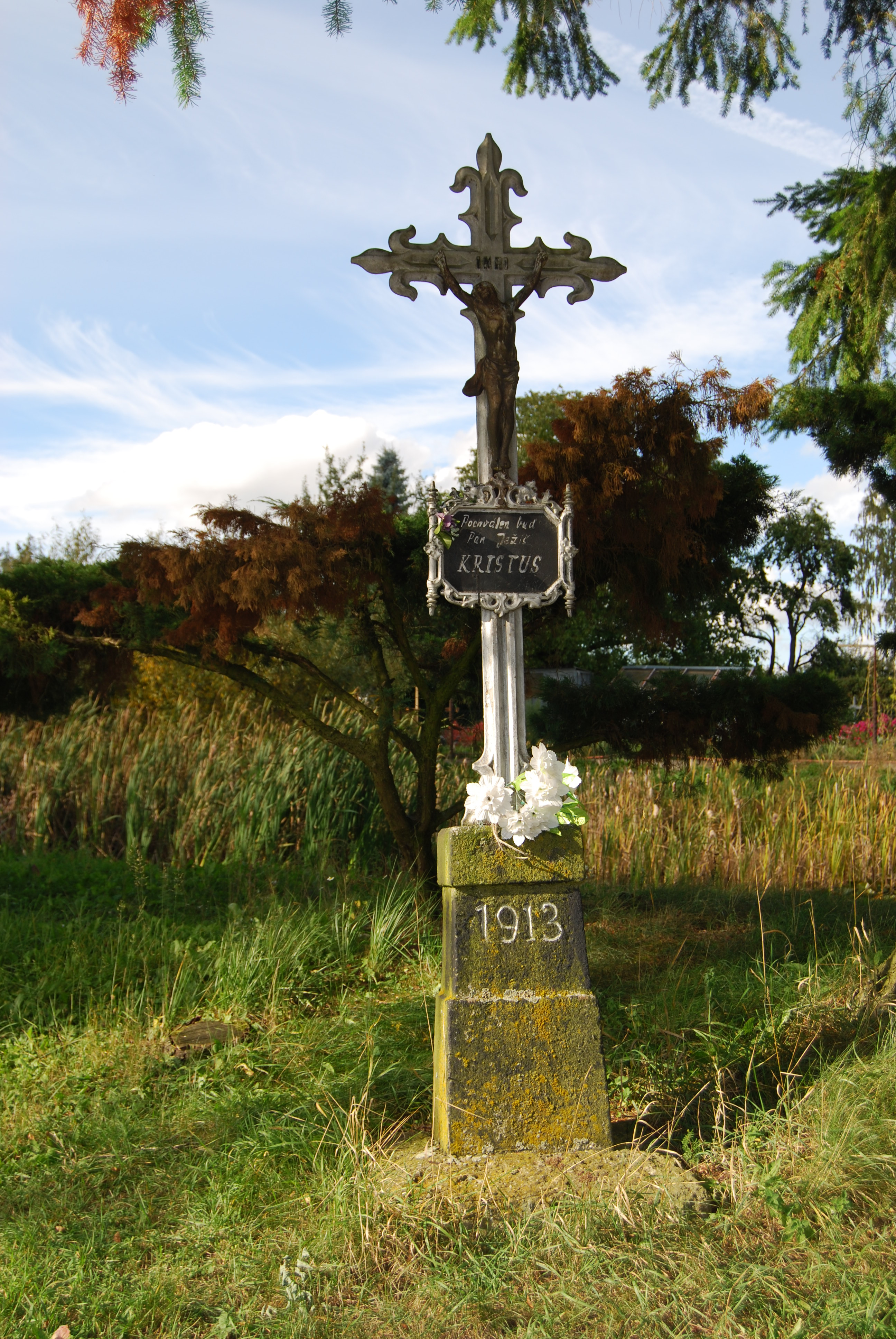 Kříž u rybníka. Popovec je část obce Zběšičky v okrese Písek. Česká republika.